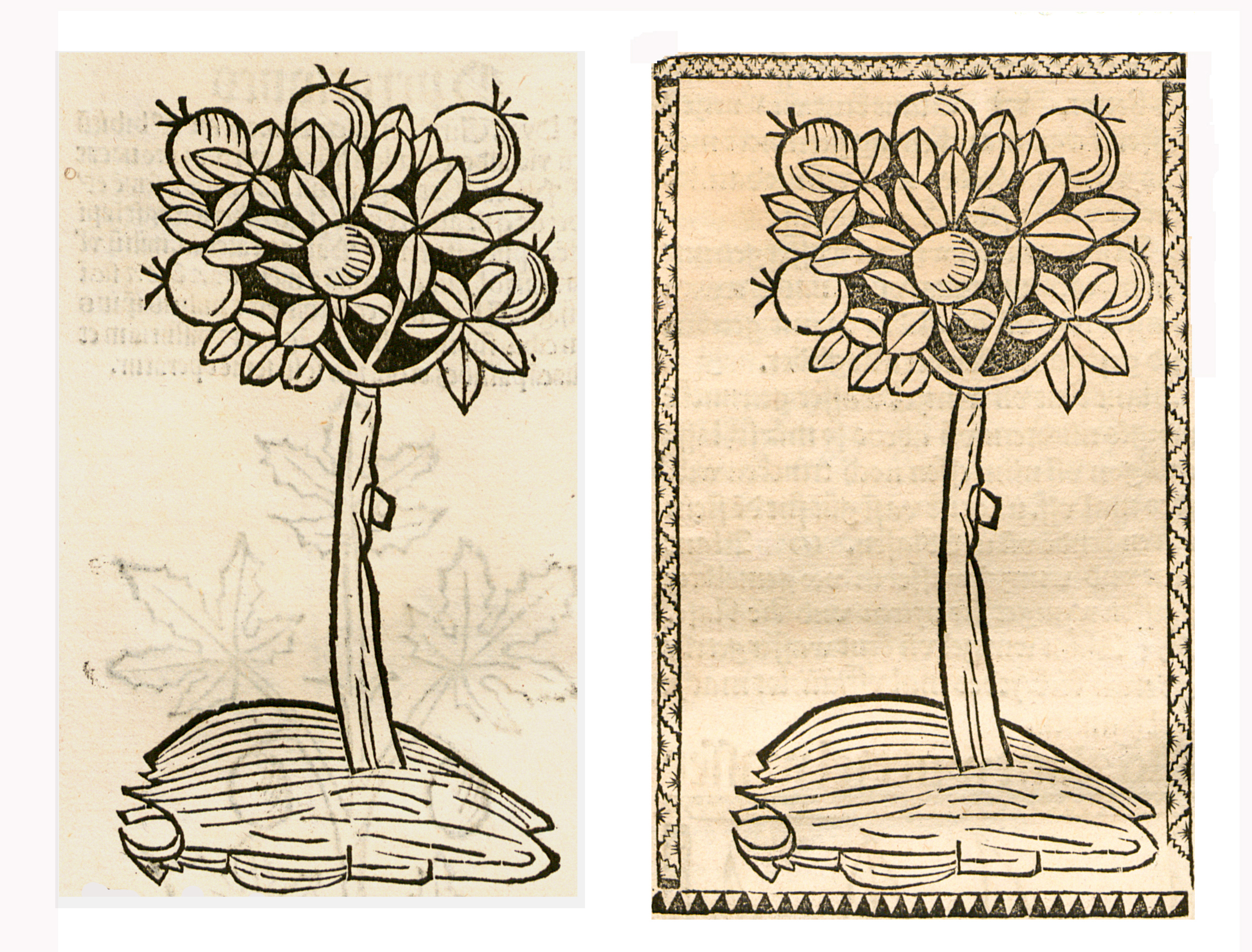 Abbildung von: Misteln